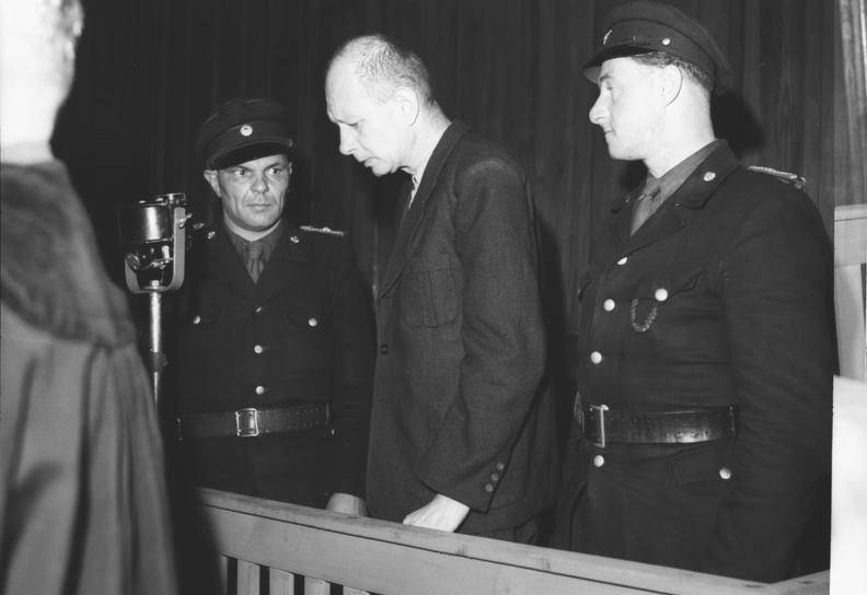 Aufn. Illus/Rudolph, 24.6.50 Im Rahmen der von der DDR eingeleiteten Prozesse gegen die aus den Internierungslagern übernommenen Kriegsverbrechen und Nazi-Aktivisten begannen am 20.6.50 im Rathaussaal von Waldheim/Sachsen die ersten Verhandlungen. Zahlreiche Delegationen der Betriebe, sowie Vertreter der in- und ausländischen Presse nahmen an diesen Prozessen teil. Hauptverhandlung am 21.6.50 gegen den 44-jährigen Ernst Heinicker aus Dresden. Er wurde überführt, als Sturmführer der SA und stellvertretender Lagerkommandant des Konzentrationslagers Hohenstein in der Zeit von September 1933 bis Juli 1934 an Ermordungen, Folterungen und sonstigen Grausamkeiten an politischen Häftlingen teilgenommen zu haben. Das Urteil lautet nach Kontrollratsgesetz Nr. 10 und Direktive 38 auf Todesstrafe wegen Verbrechens gegen die Menschlichkeit. UBz: Der Angeklagte Heinicker 6955-50